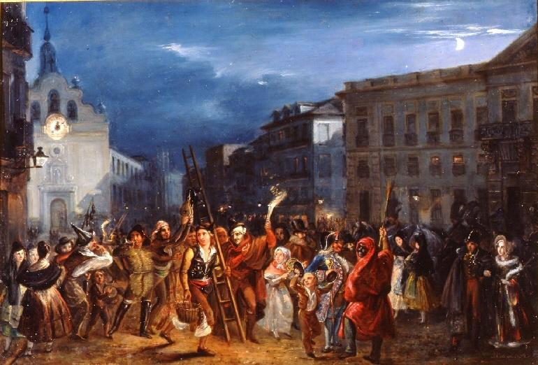 La obra representa la noche de Reyes en la Puerta del Sol de Madrid, (España).